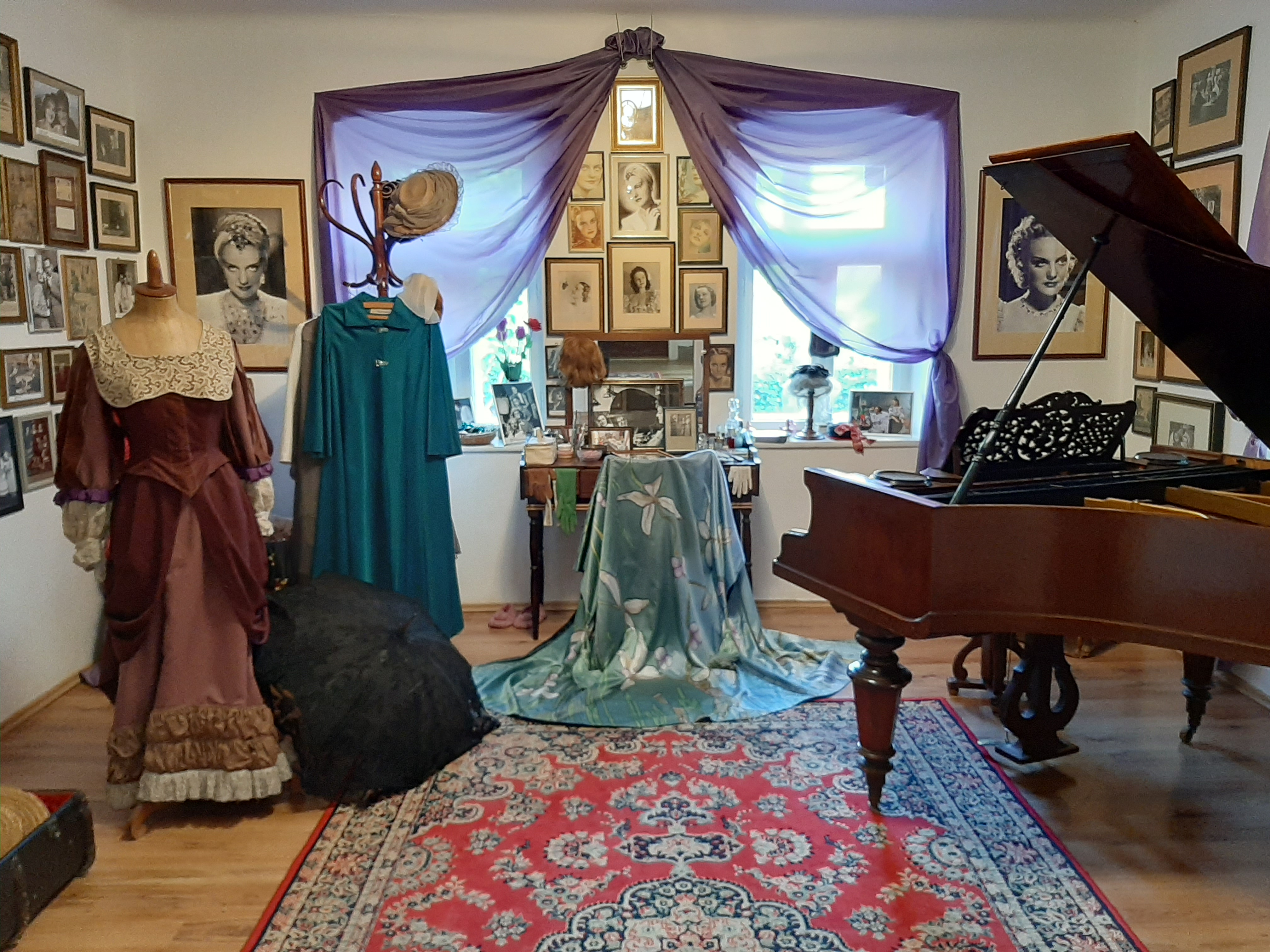 A Tolnay Klári Emlékház 2020-ban megújult tárlata.